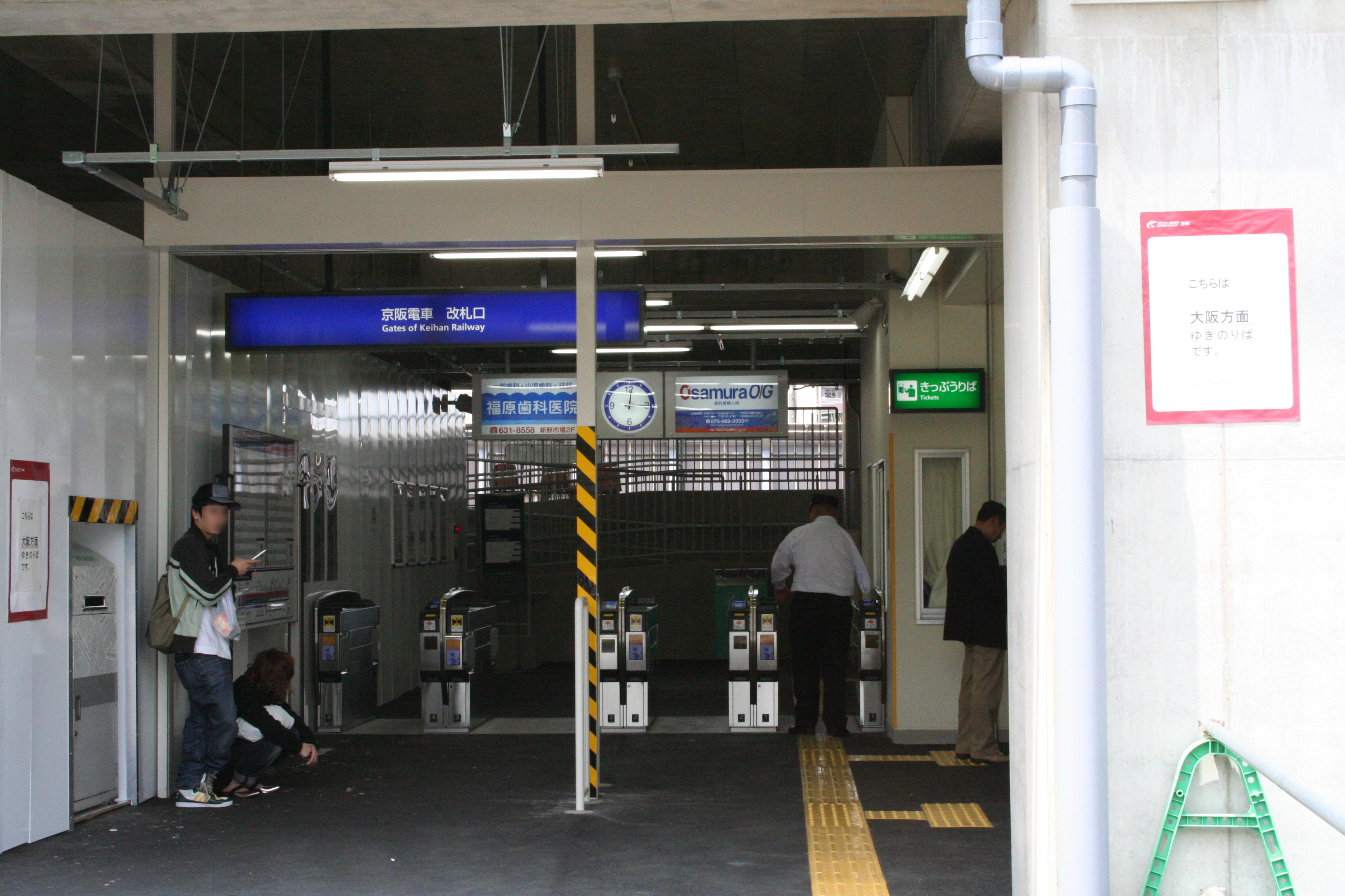 京阪電鉄 淀駅（淀屋橋方面仮改札口） 撮影日: 2006年4月30日 撮影者: Goki